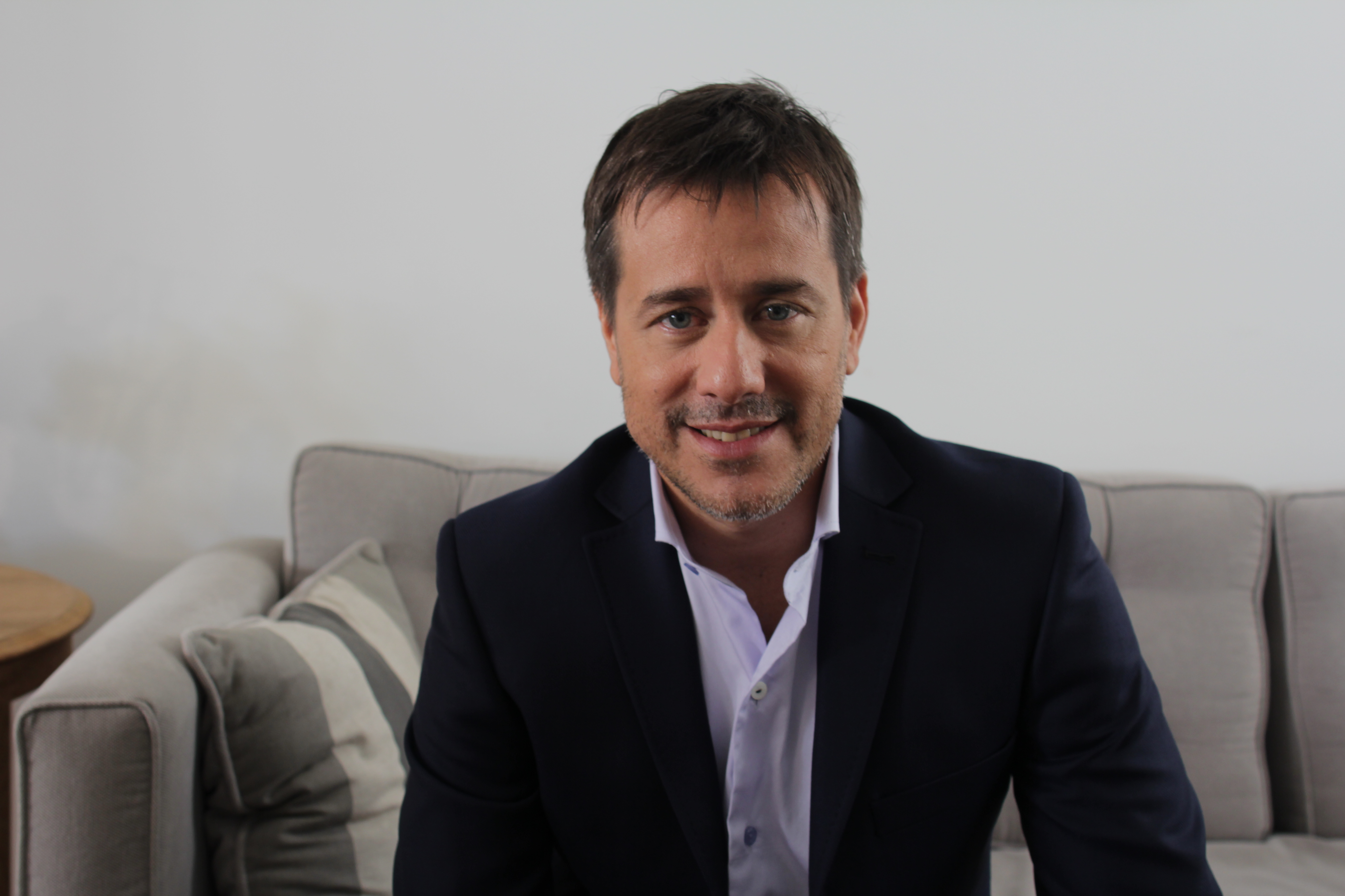 Mariano Recalde, legislador porteño por Unidad Ciudadana